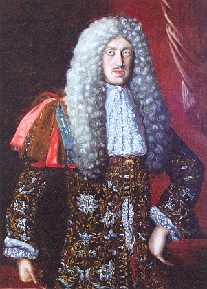 Jan Kristián portét